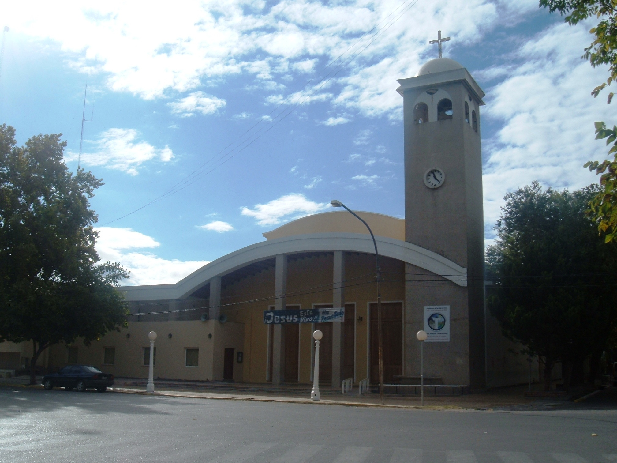 Vista de la Iglesia matriz de la localidad cabecera de Santa Lucía, en el departamento del mismo nombre, provincia de San Juan, Argentina.